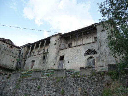 Palazzo Garrafa già Tocci, sec. XVII. , San Martino di Finita